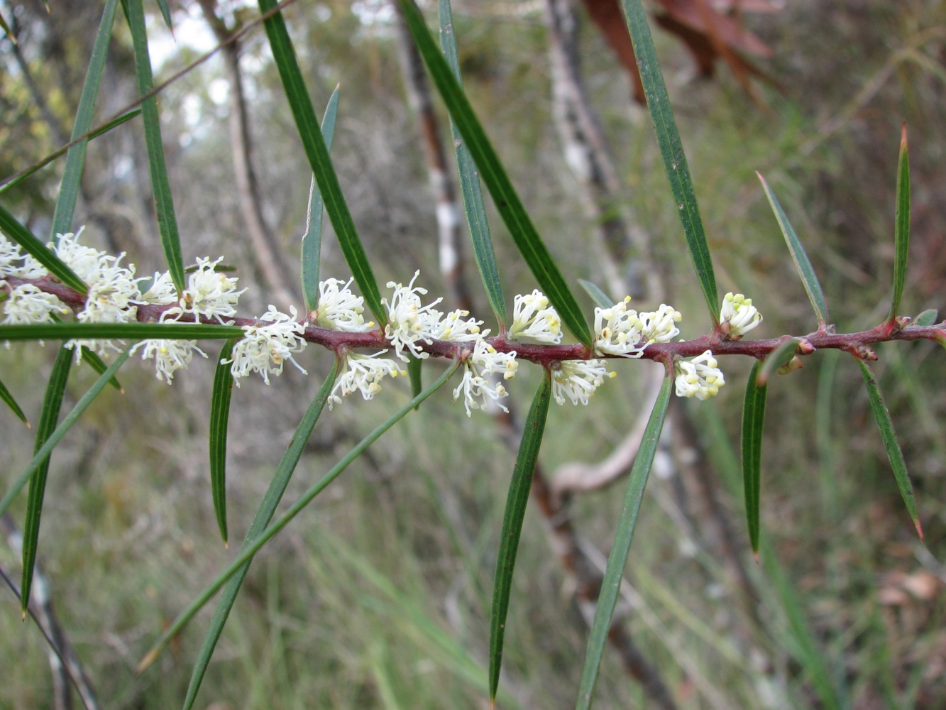 Hakea ulicina, Bunyip State Park Victoria, Australia